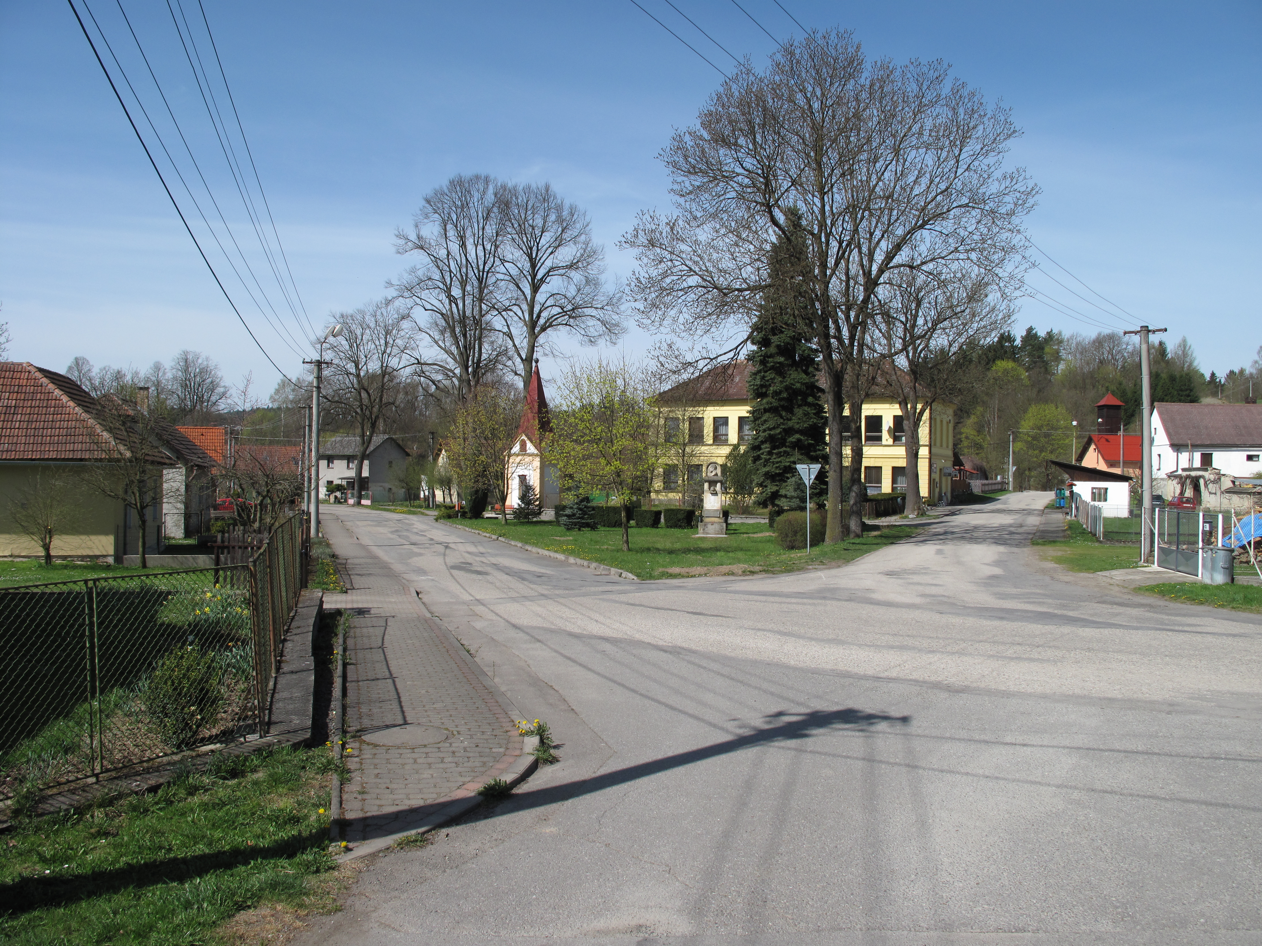 Náves v Kletečné. Okres Pelhřimov, Česká republika.